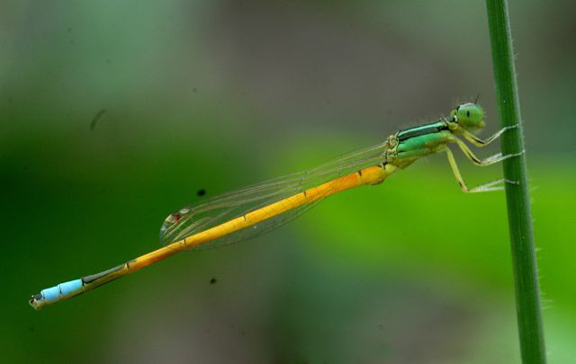 Ishneura aurora(male) damselfly, Bannerghatta, India